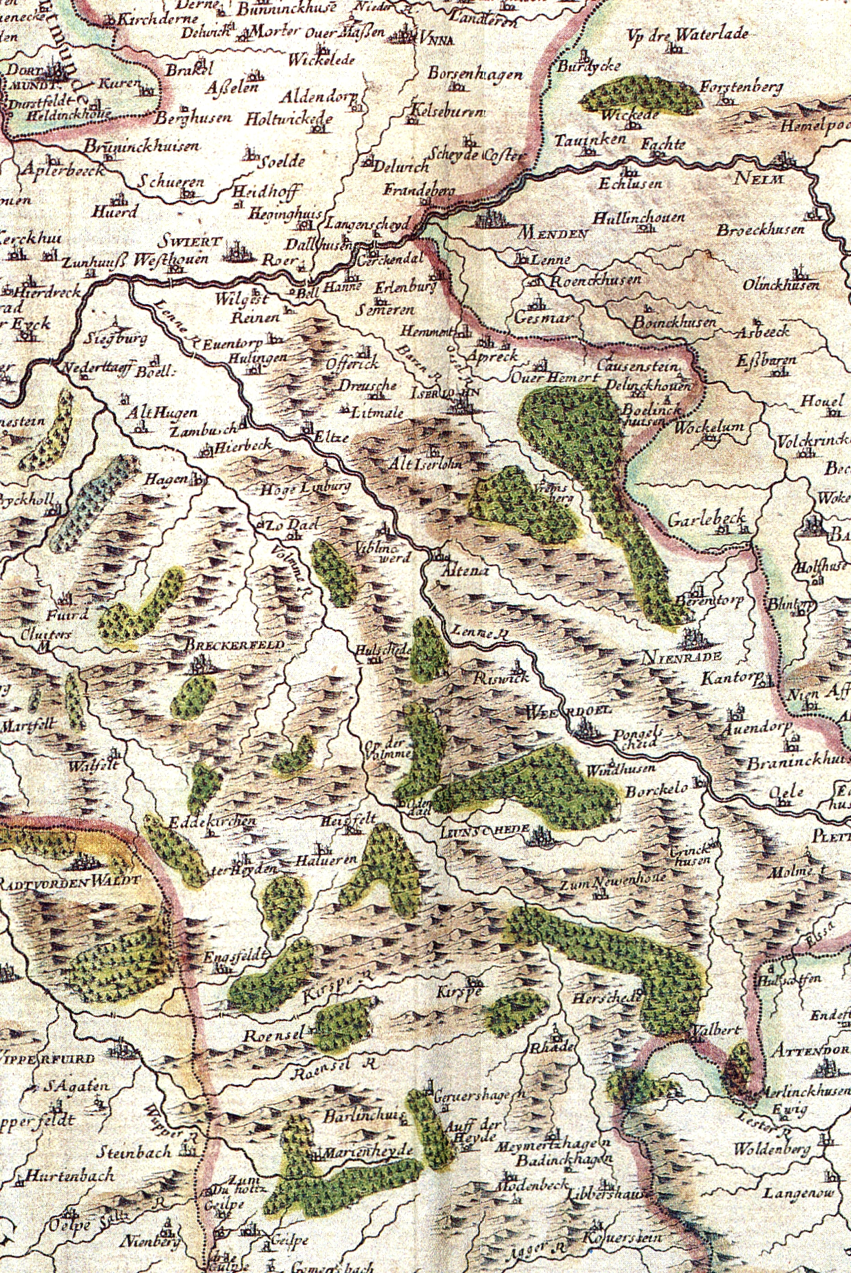 Ausschnitt (Nordsüdrichtung Unna ←→ Meinerzhagen, Westostrichtung Hagen ←→ Balve) aus der Karte „LE COMTE DE LA MARCK“, 1681, S. Sanson